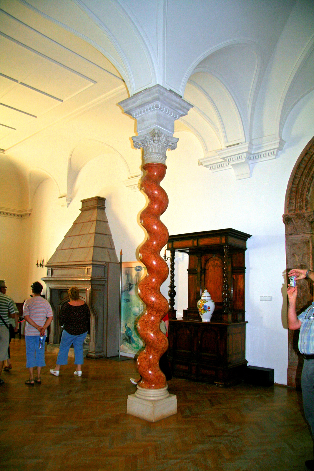 Volt Károlyi-kastély (Füzérradvány, Kossuth u. 2.) This is a photo of a monument in Hungary, Identifier: 2768